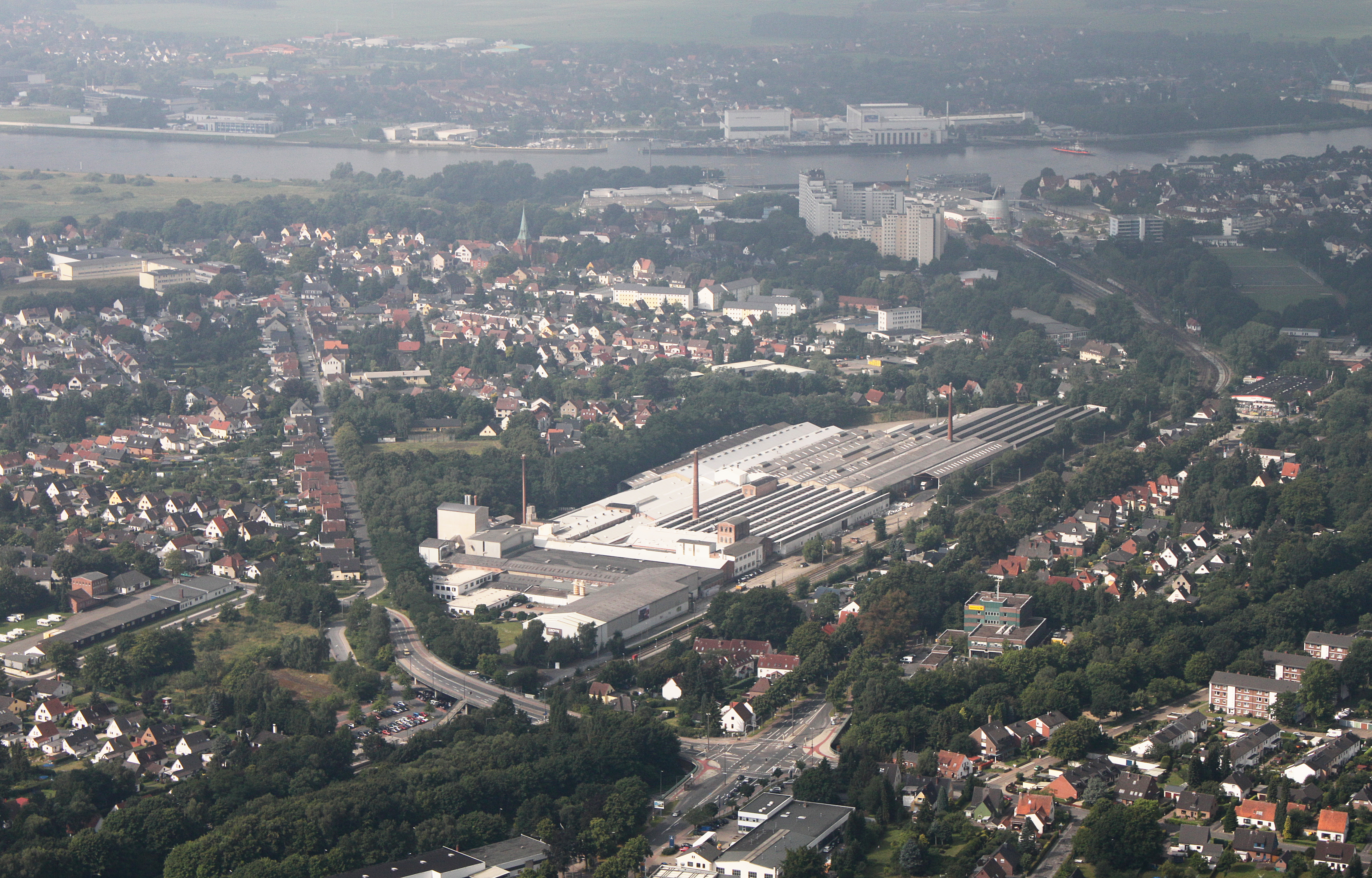 Norddeutsche Steingut; Bremen-Nord; Fotoflug Bremen; Flughöhe 500 m; von der Autobahnabfahrt der A 27 in Bremen-Nord über Vegesack zum U-Boot Bunker Valentin